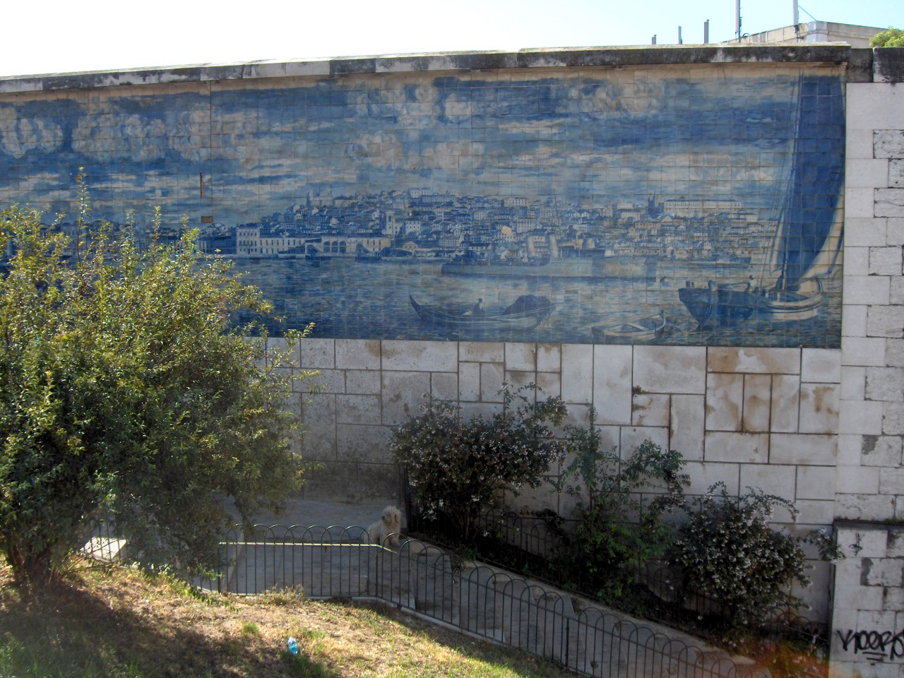 Miradouro de Santa Luzia; azulejo on wall; Lisbon, Portugal